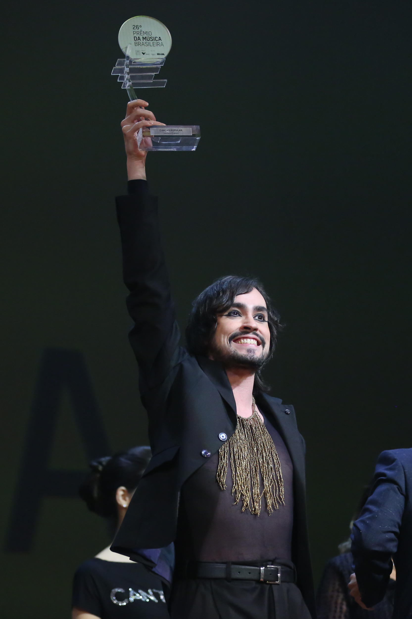 Prêmio Cancão Popular / Melhor Cantor - Johnny Hooker - 26° Prêmio da Música Brasileira 2015, no Theatro Municipal, no Centro do Rio de Janeiro/RJ. (10/06/15) Foto: Roberto Filho/Divulgacão